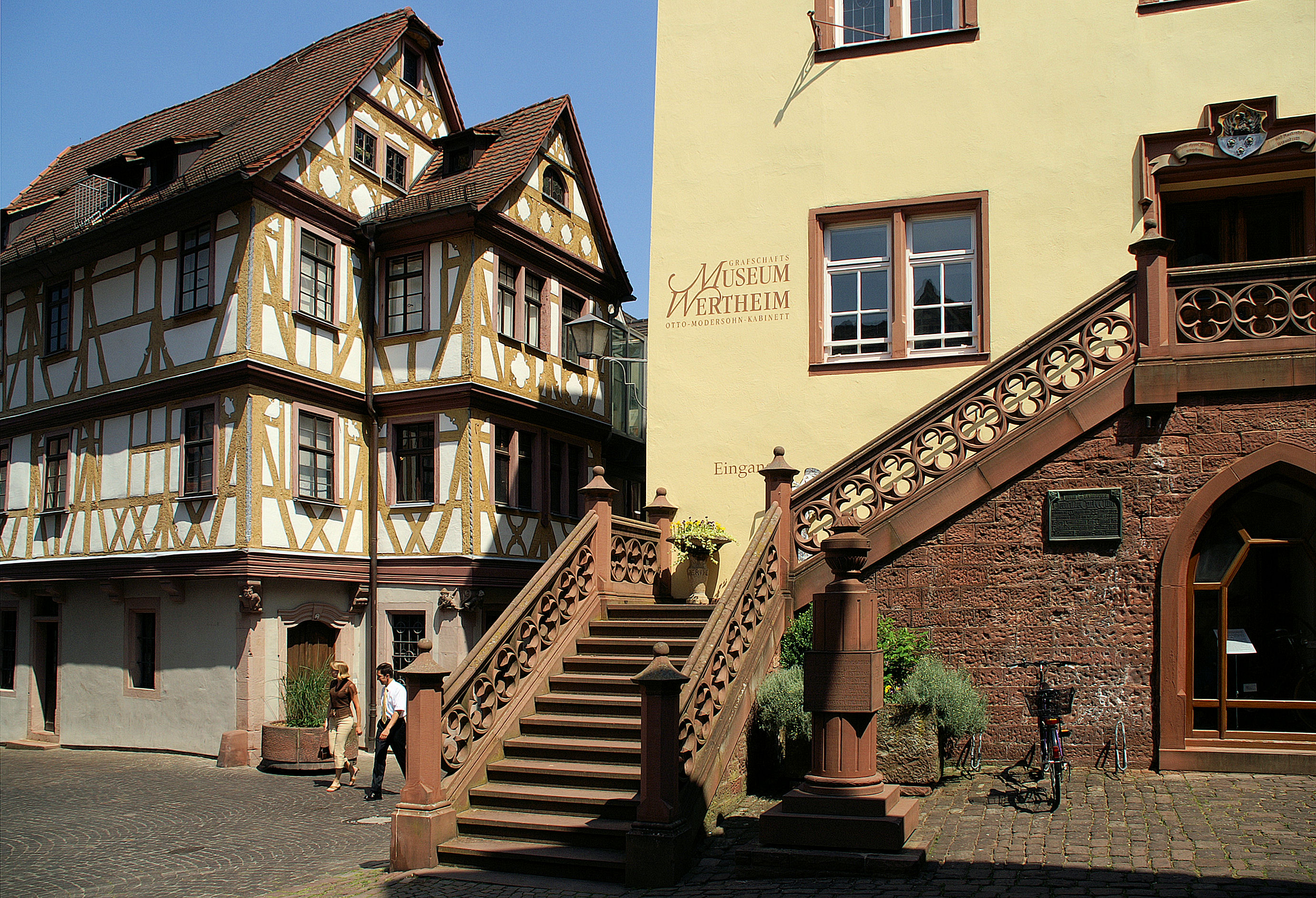 Freitreppe zum Grafschaftsmuseum, im Hintergrund das "Haus zu den Vier Gekrönten"